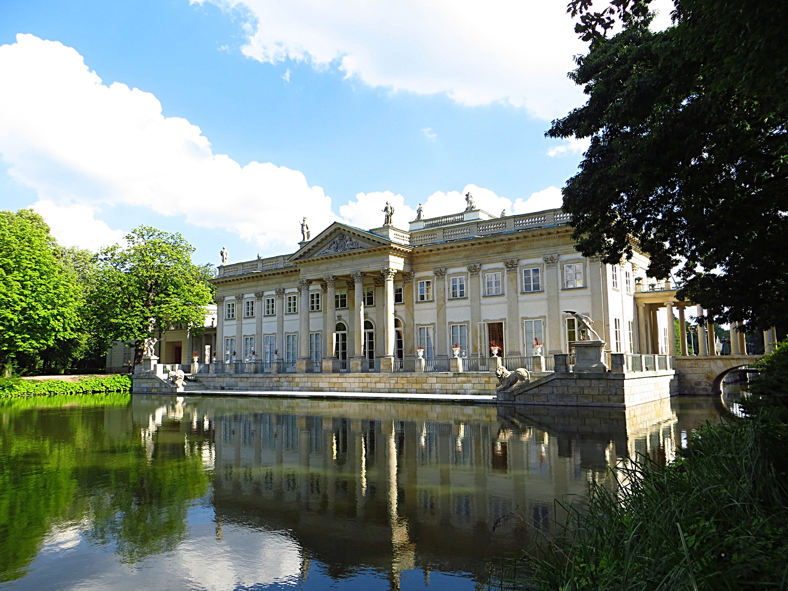 Łazienki Królewskie - Pałac na Wyspie